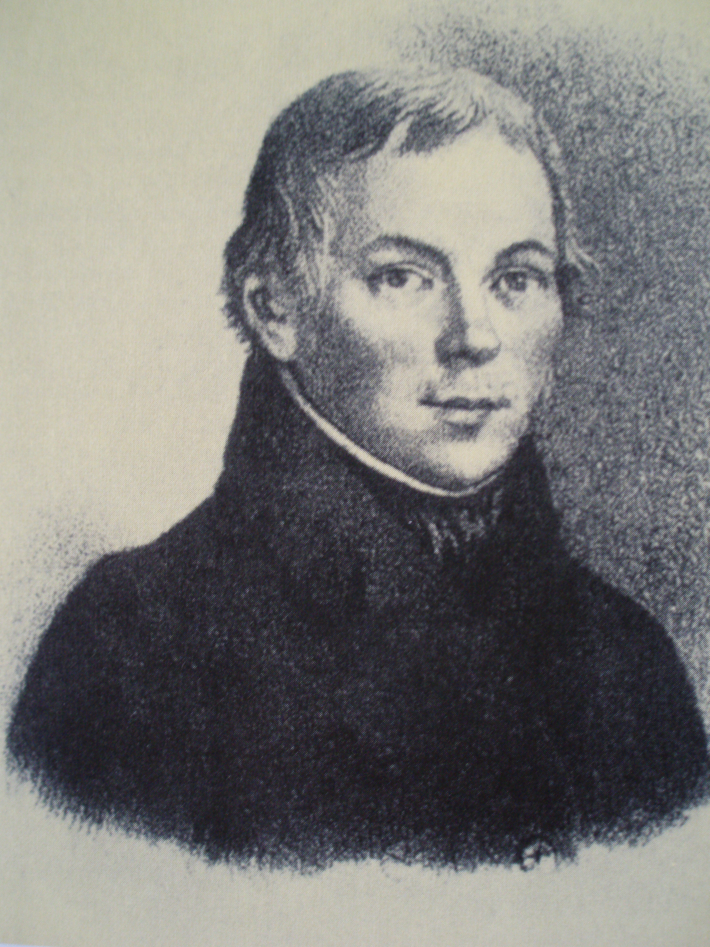 basnik Antonin Puchmajer